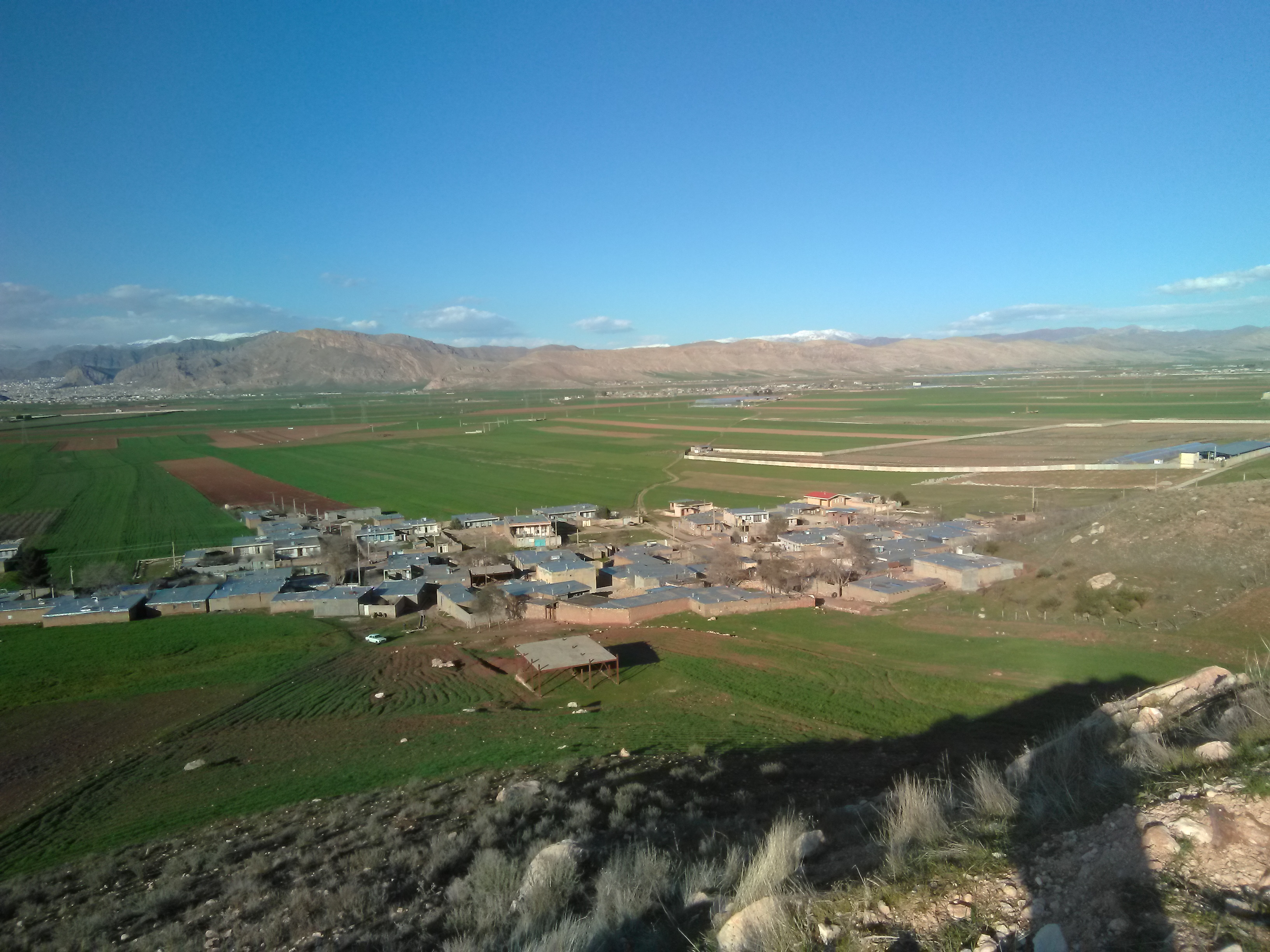 نمایی از روستای چشمه سرخه از بالای تپه میانی مشرف به آن